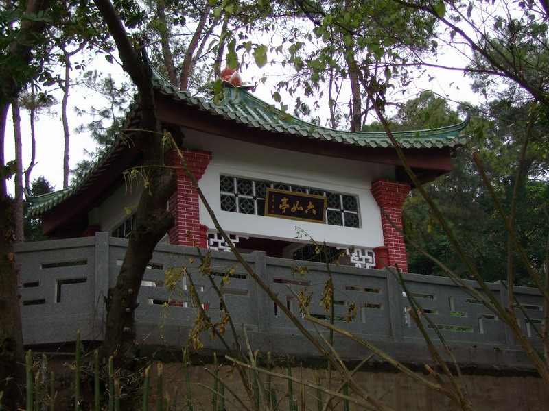 惠州西湖六如亭